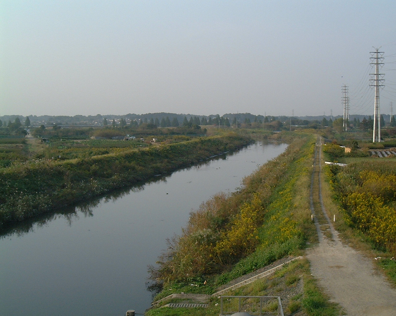 芝川（埼玉県さいたま市）